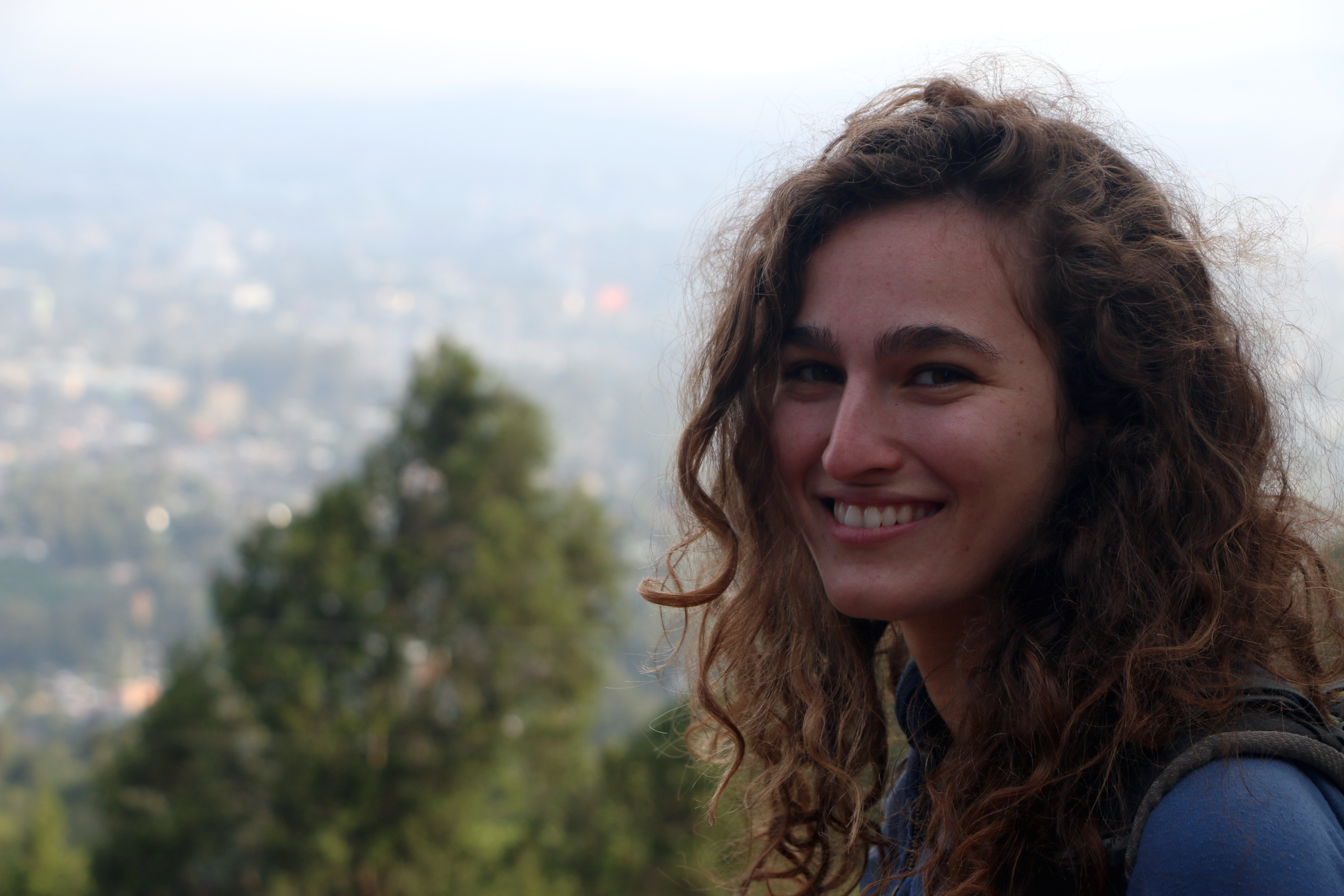 ענת קורול